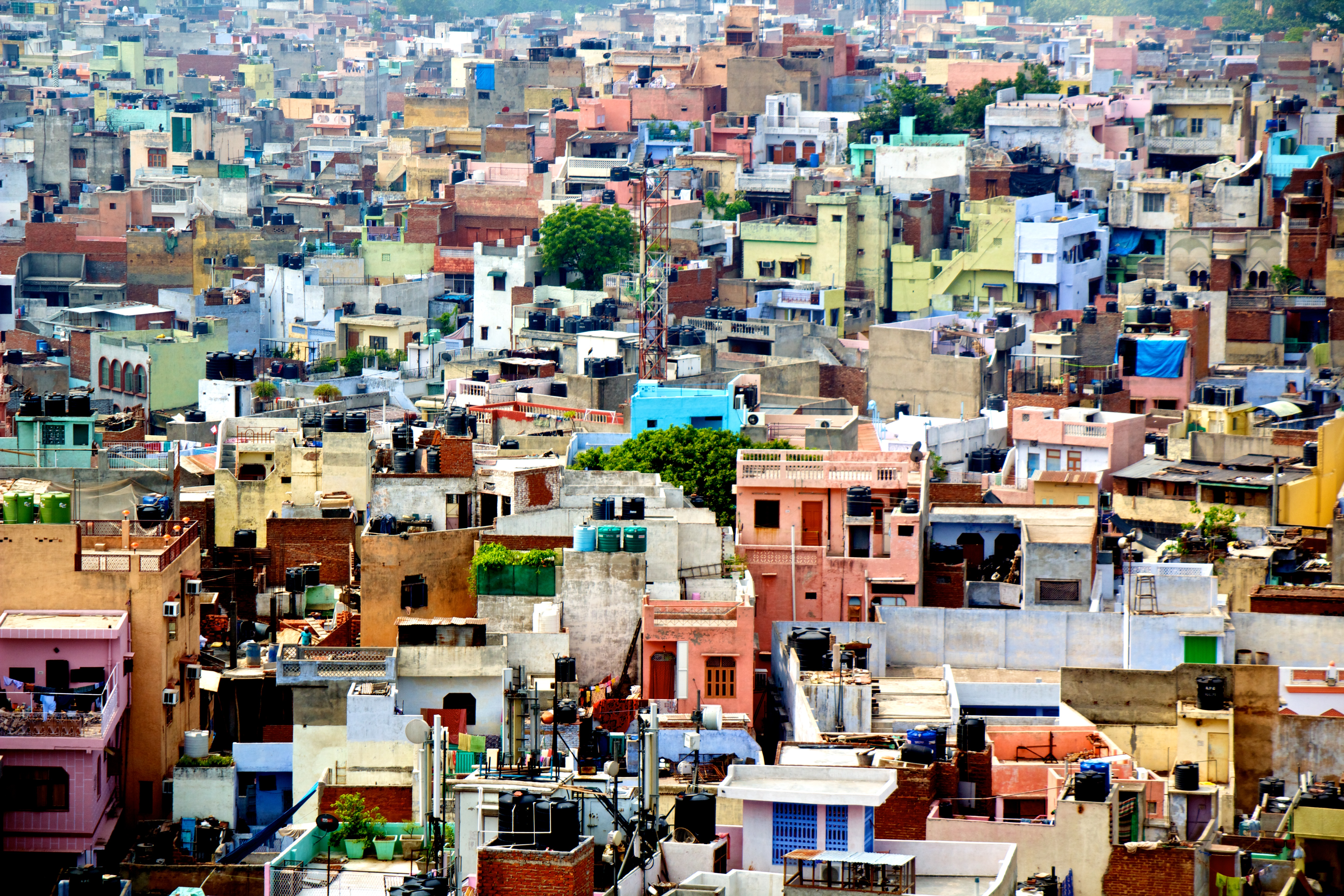 Old Delhi from Jama Masjid mosque minaret